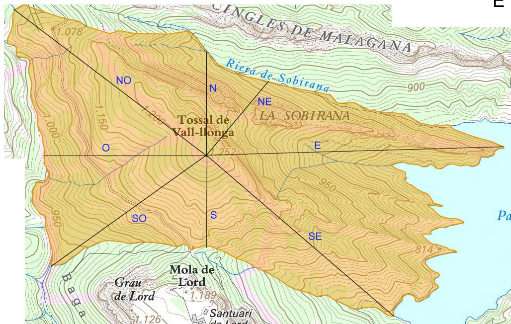 Mapa topogràfic del Tossal de Vallonga (Vall de Lord, Solsonès)